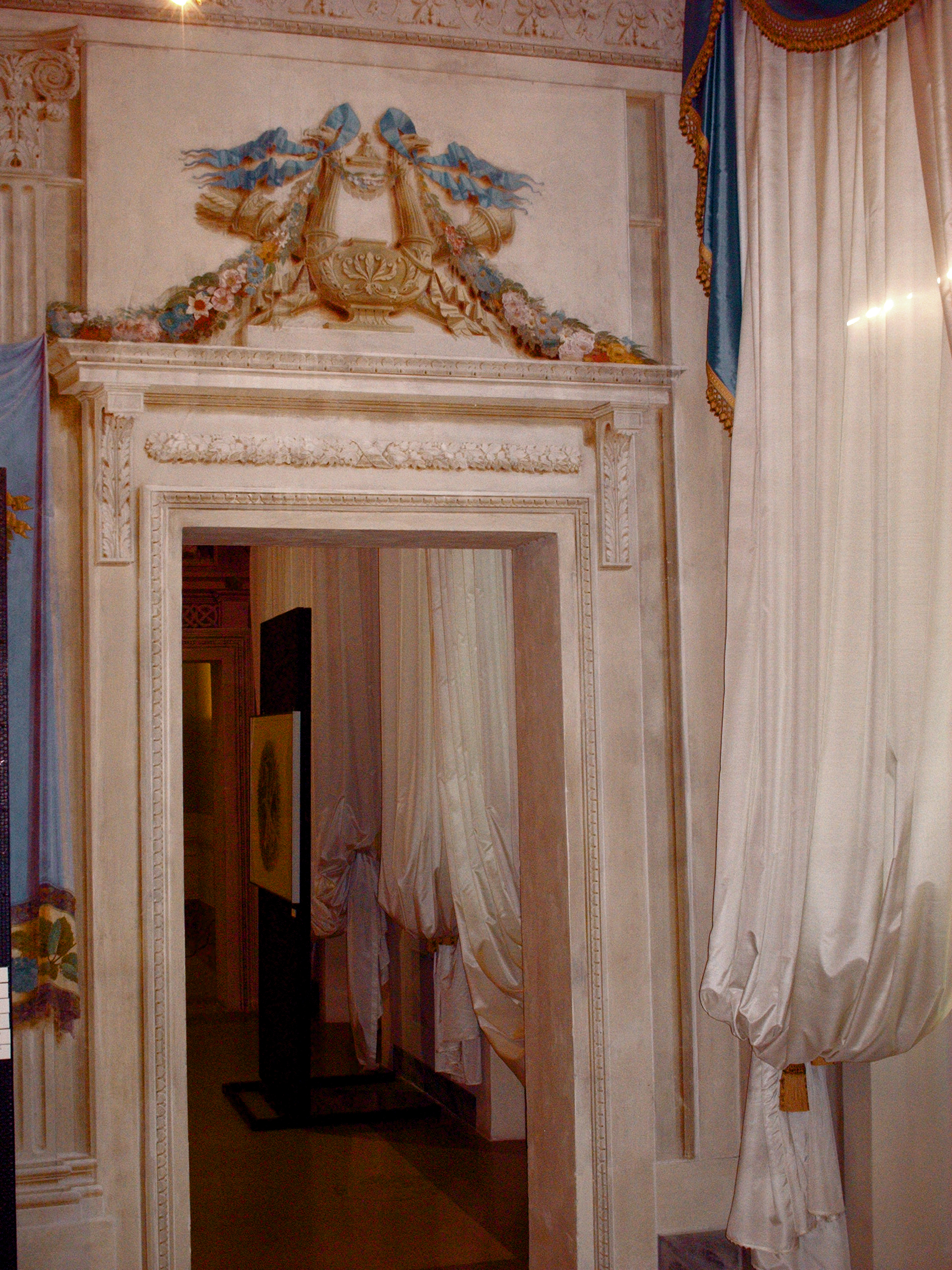 Villa Paolina a Viareggio, particolare degli interni